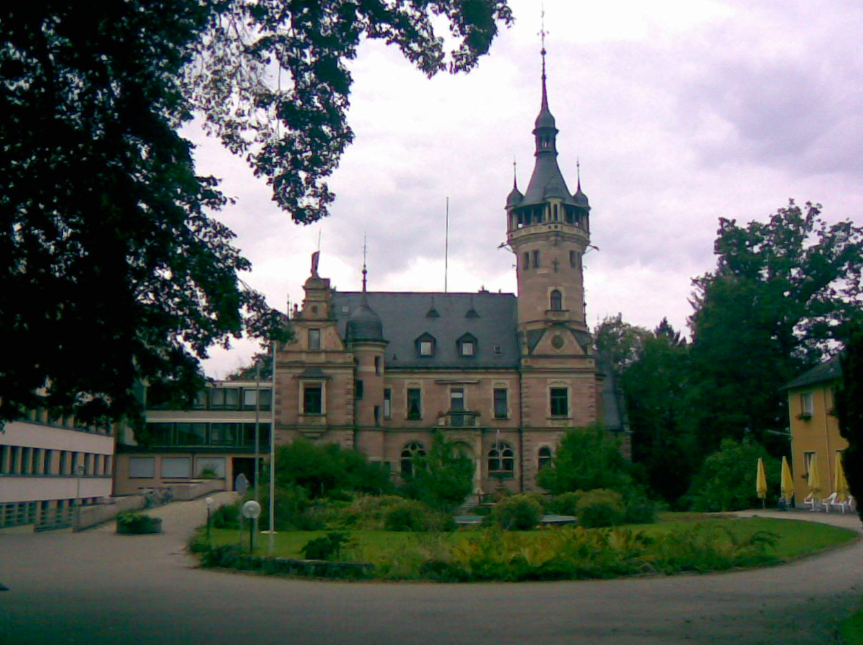 Faberschloss in Schwarzenbruck bei Nürnberg, Dürrenhembacher Straße 15